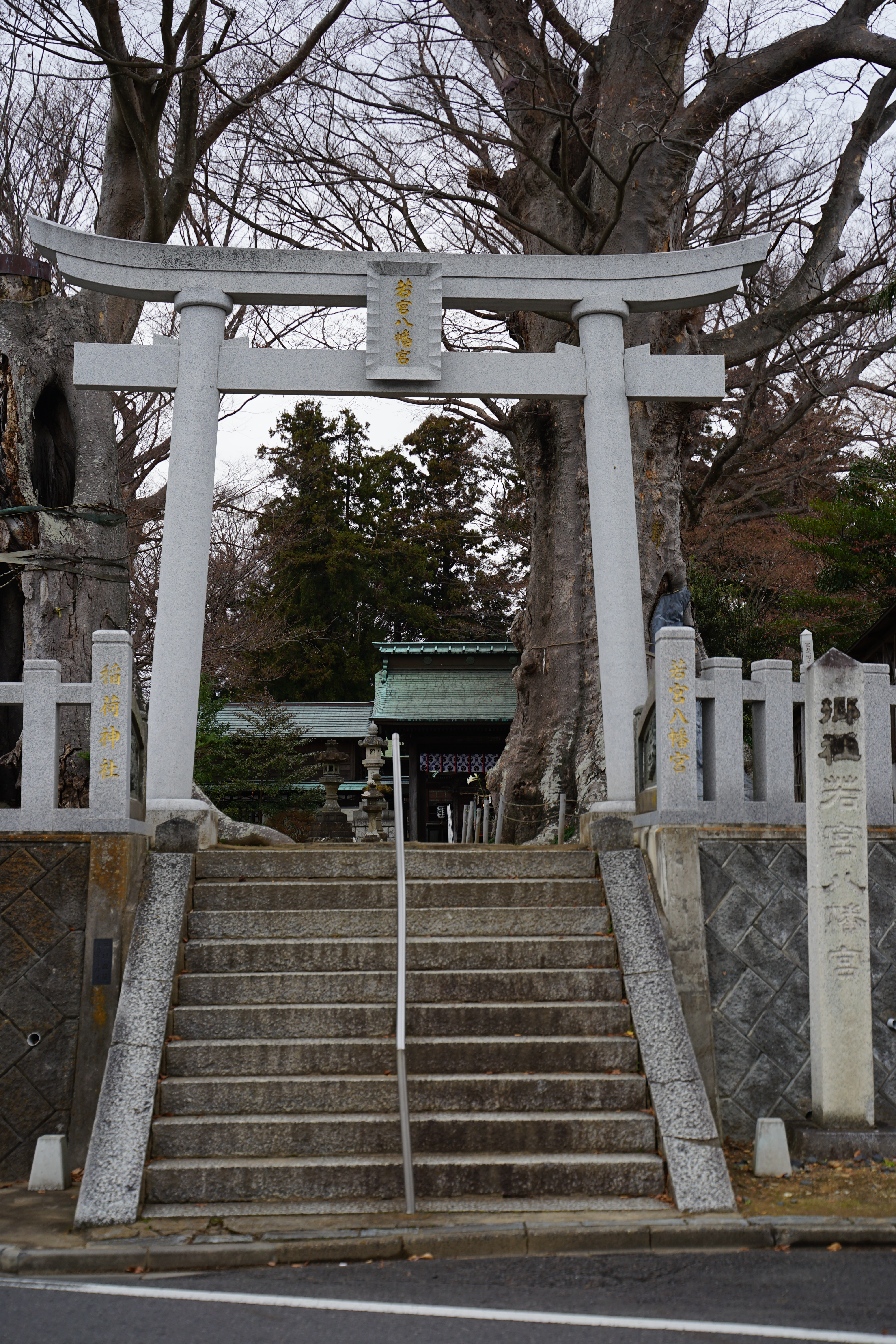 若宮八幡宮の鳥居（茨城県常陸太田市）